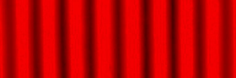 Weißlichtinterferogramm (Rotkanal)